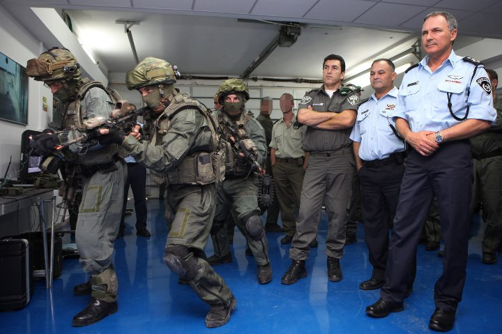 ביקור המפכ"ל בימ"מ